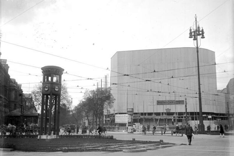 Am Potsdamer Platz in Berlin ist zum Zwecke des Neubaues eines grossen Warenhauses ein Bretterzaun errichtet worden, welcher über 4 Stockwerk hoch ist und ca. 1500 qum Fläche umfässt. Während der Bauzeit soll dieser Zaun zu Reklamezwecken verwandt werden. Information added by Wikimedia users.Ergänzung: Gebaut wird das Columbushaus anstelle des abgerissenen Grand Hotel Bellevue. Der Blick geht in die Bellevuestraße.